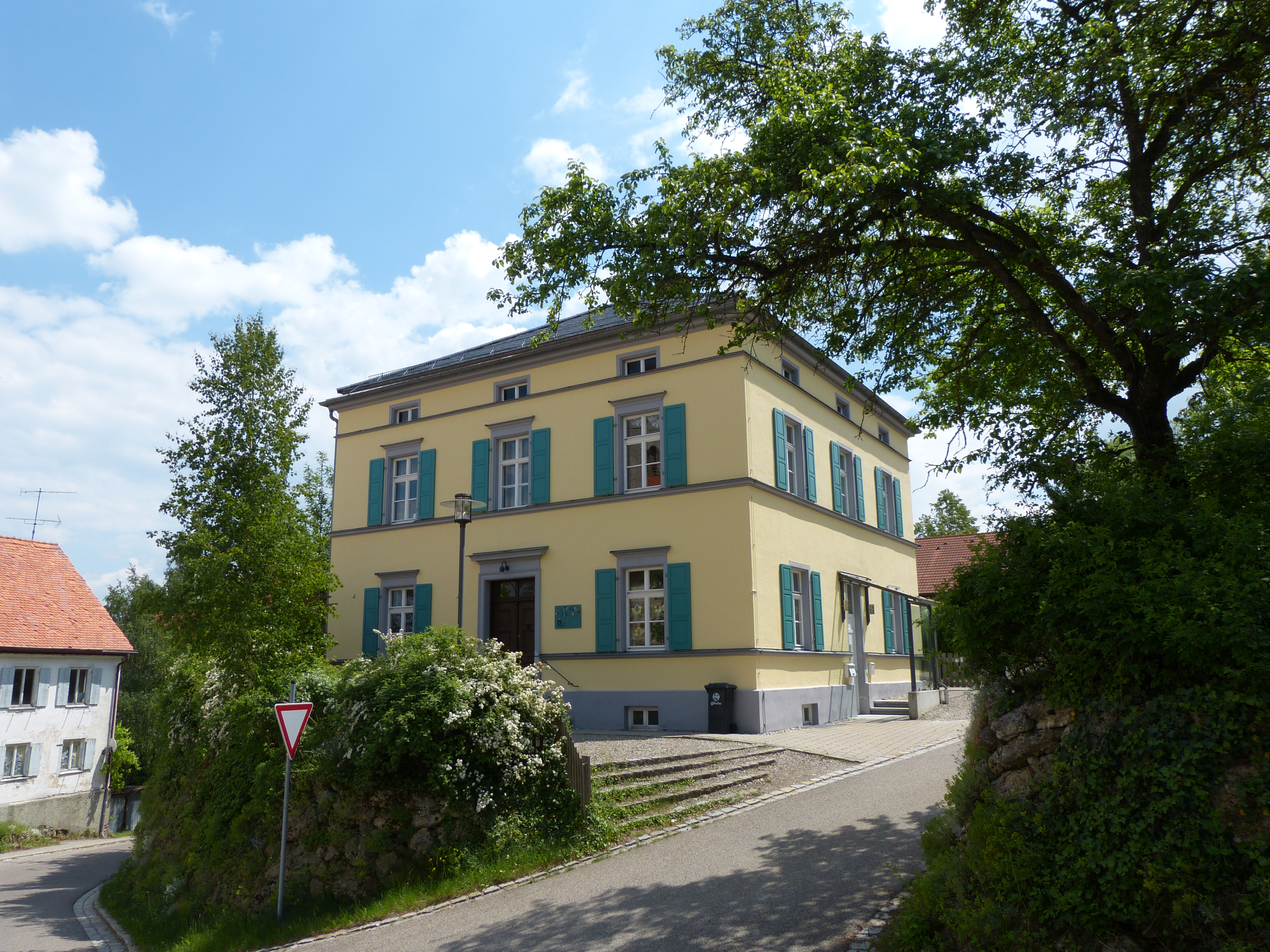 Baudenkmal in Böhen, Landkreis Unterallgäu, Bayern